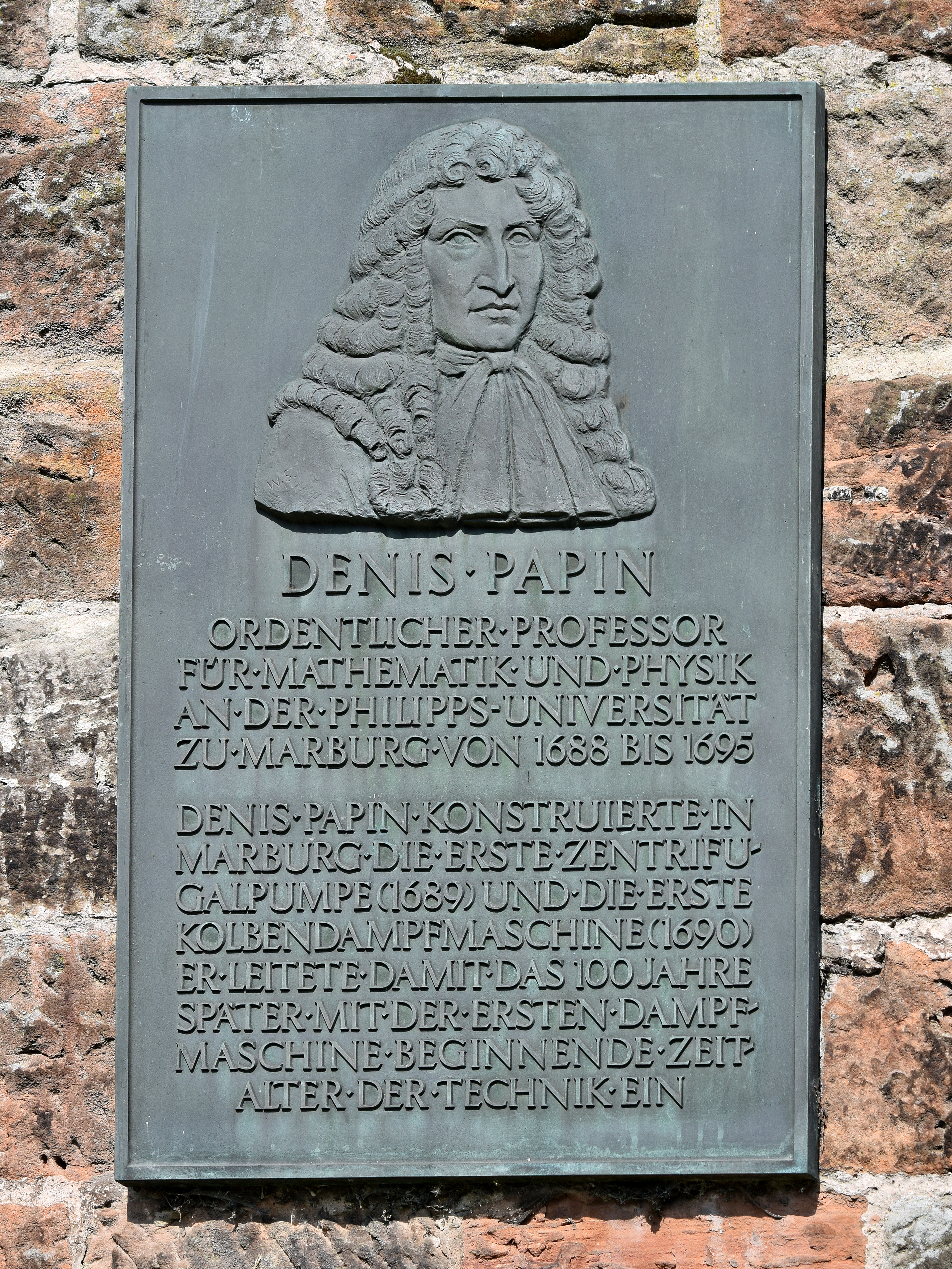 Gedenktafel an Denis Papin in Marburg bei der Mühltreppe, unterhalb der Alten Universität